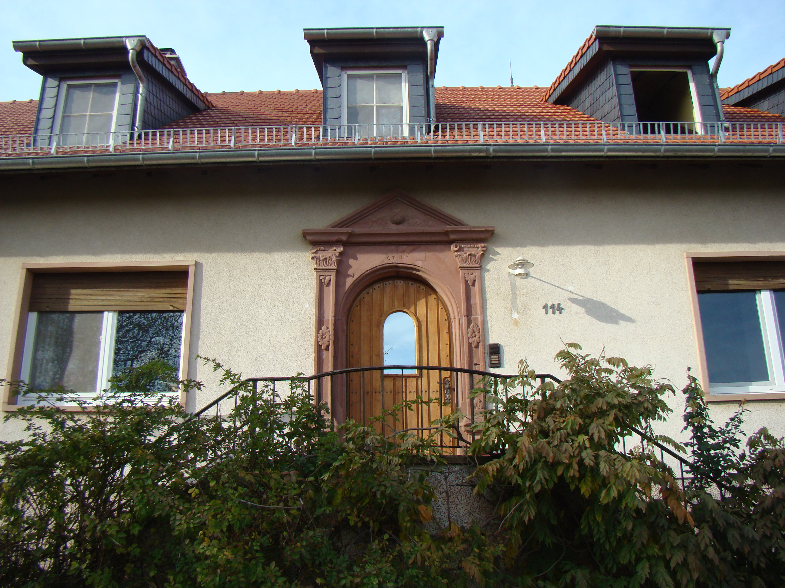 Kloster Lobenfeld, ehem. Schaffneigebäude